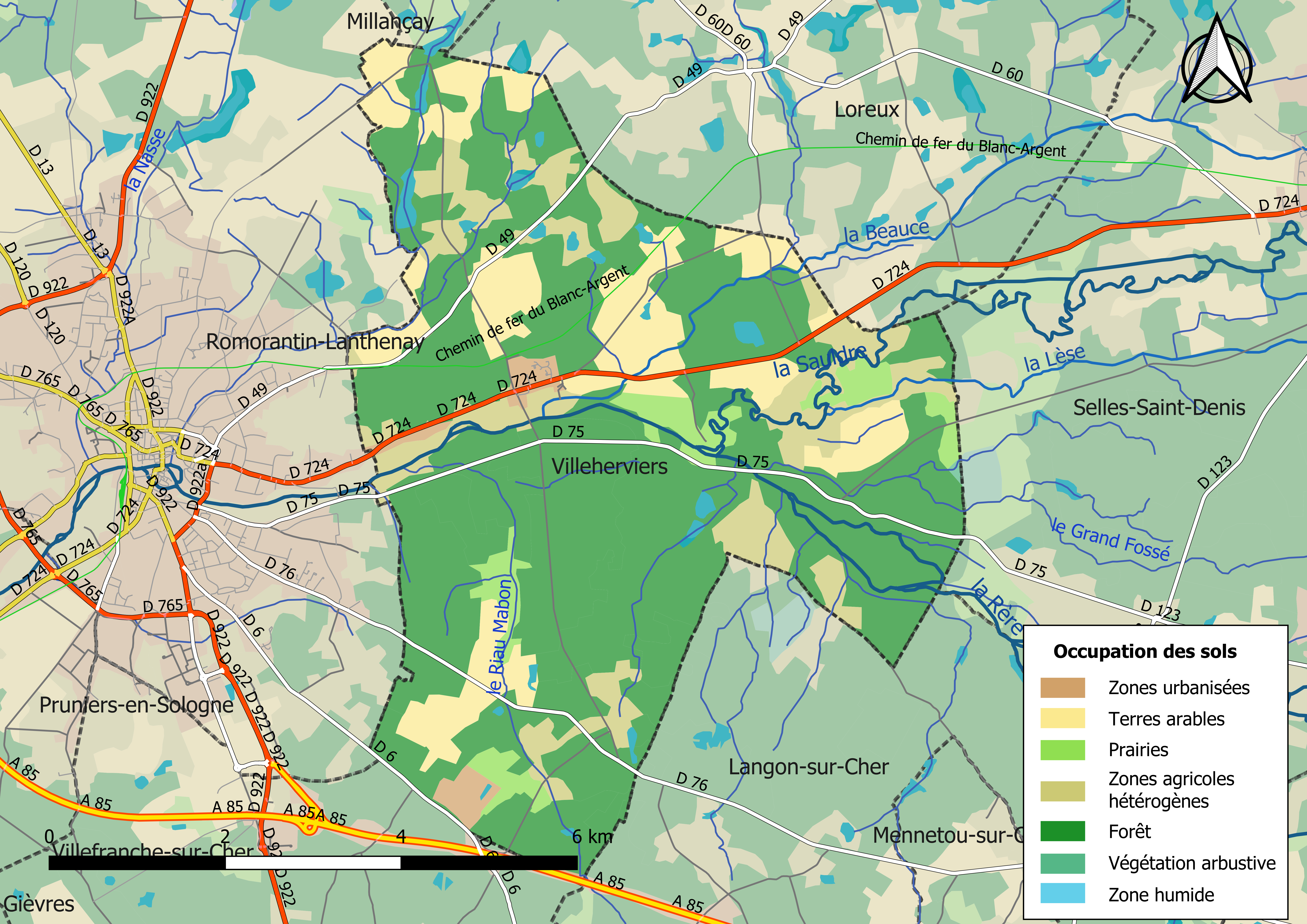 Carte des infrastructures et de l’occupation des sols en 2018 de la commune de Villeherviers (France).